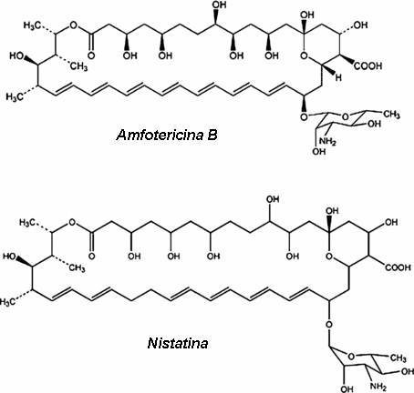 sottoscritto,propria,macrolidi,libera,nessuna